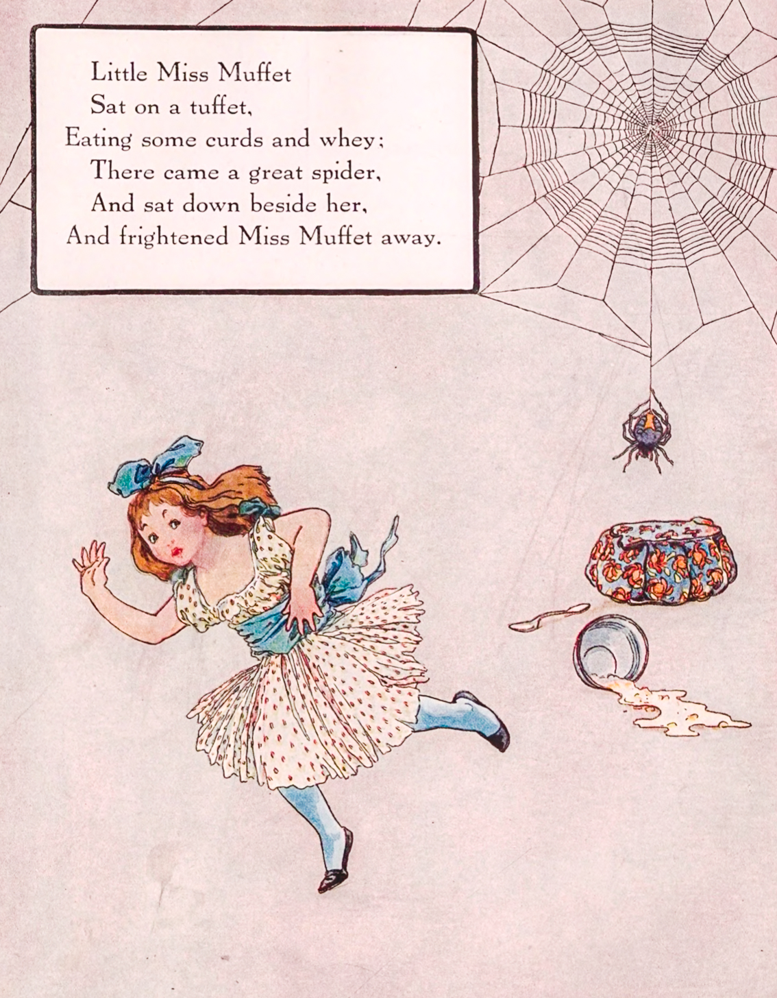 Little Miss Muffet